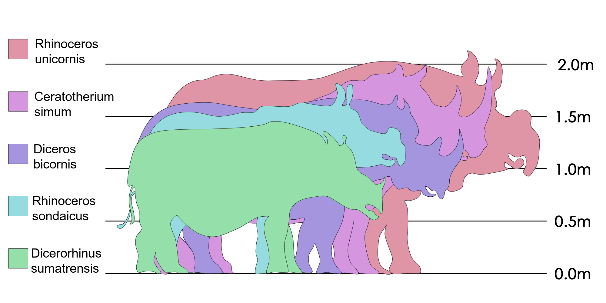 Comparatio magnitudinis specierum rhinocerotum.